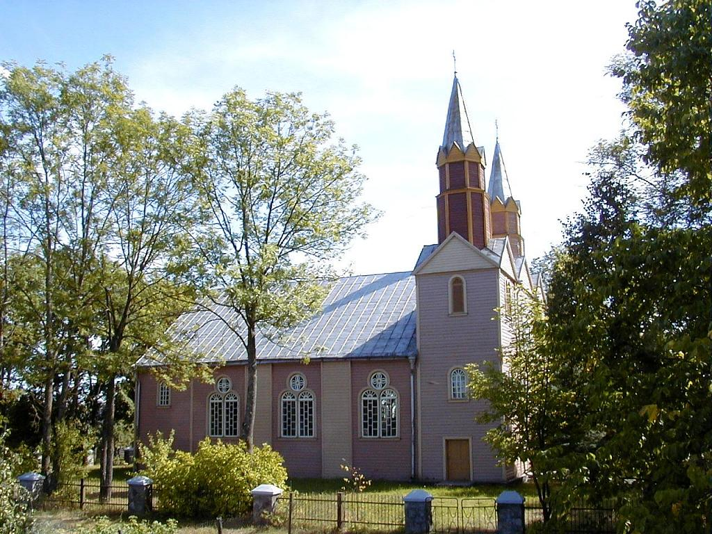 Tilžas katoļu baznīca. 2002-08-10